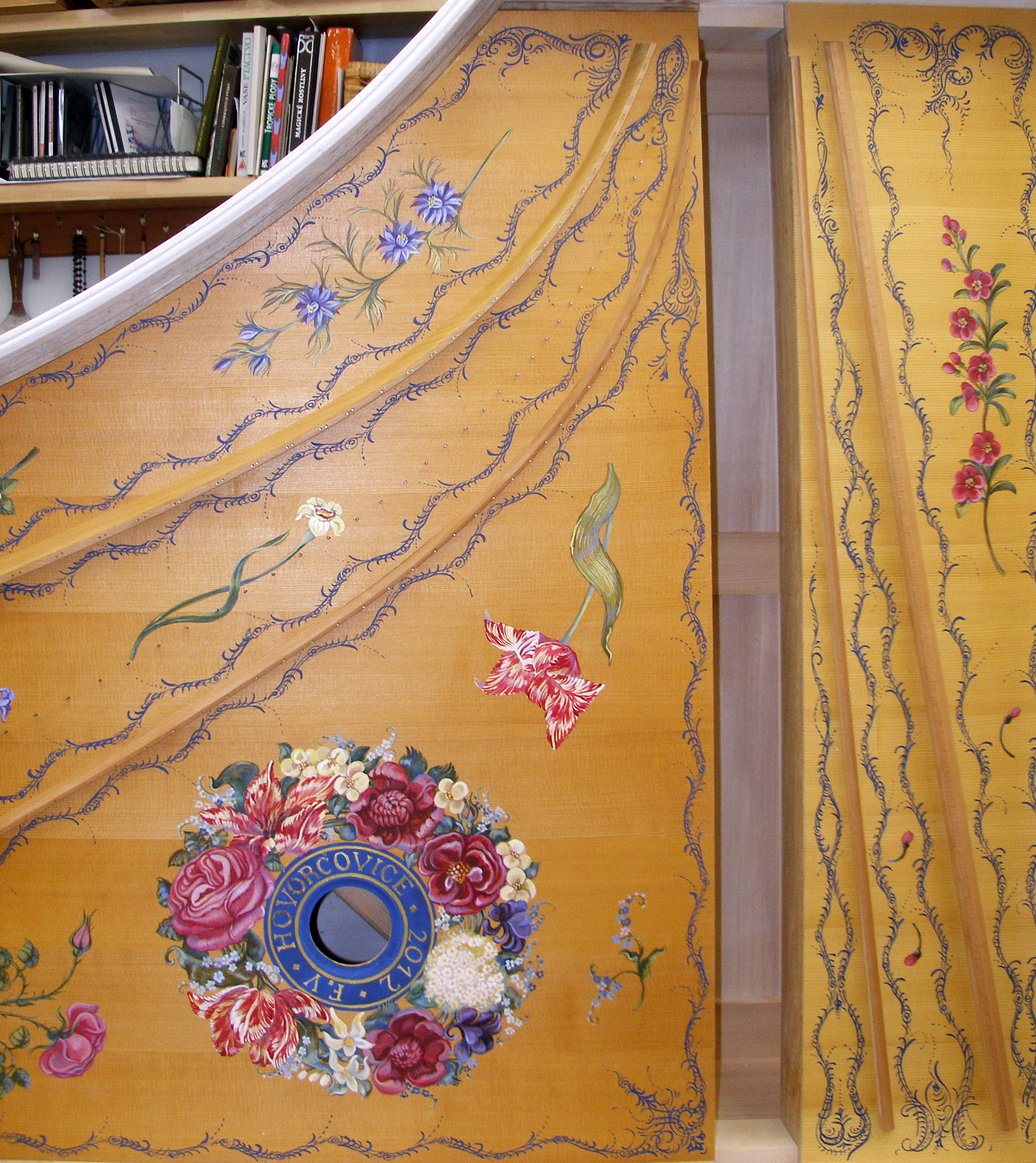 Dílo Miluše Poupětové Dekory na čembalech jsou volné, avšak dobově pojaté kopie. Toto je typ francouzský, kopie dle Hemsche, byly to vždy rodiny, několik generací, takže toto Henry Hemsch, 1754.